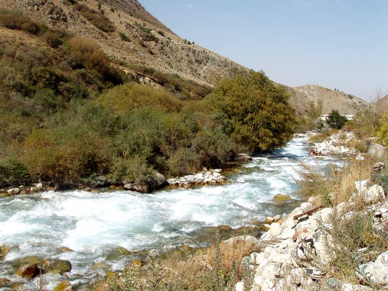 Река Ысык-Ата